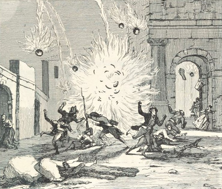 Le siège de Roses (28 novembre 1794-4 février 1795). L'artillerie française pilonne la ville depuis les hauteurs environnantes.